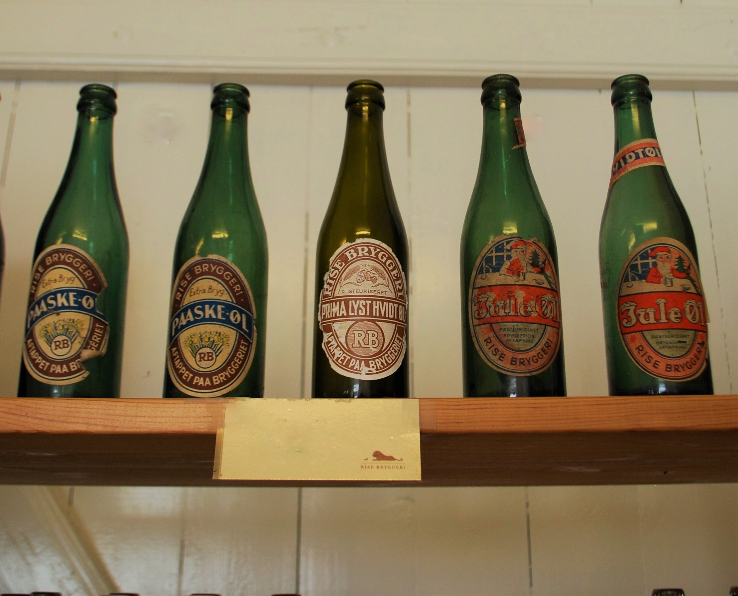 Rise Bryggeris øl fra 1950erne